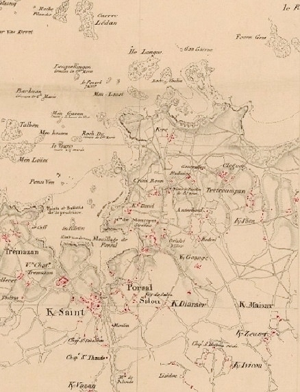 Carte de Portsall à la fin du XVIIIe siècle (Bibliothèque nationale de France, département Cartes et plans)